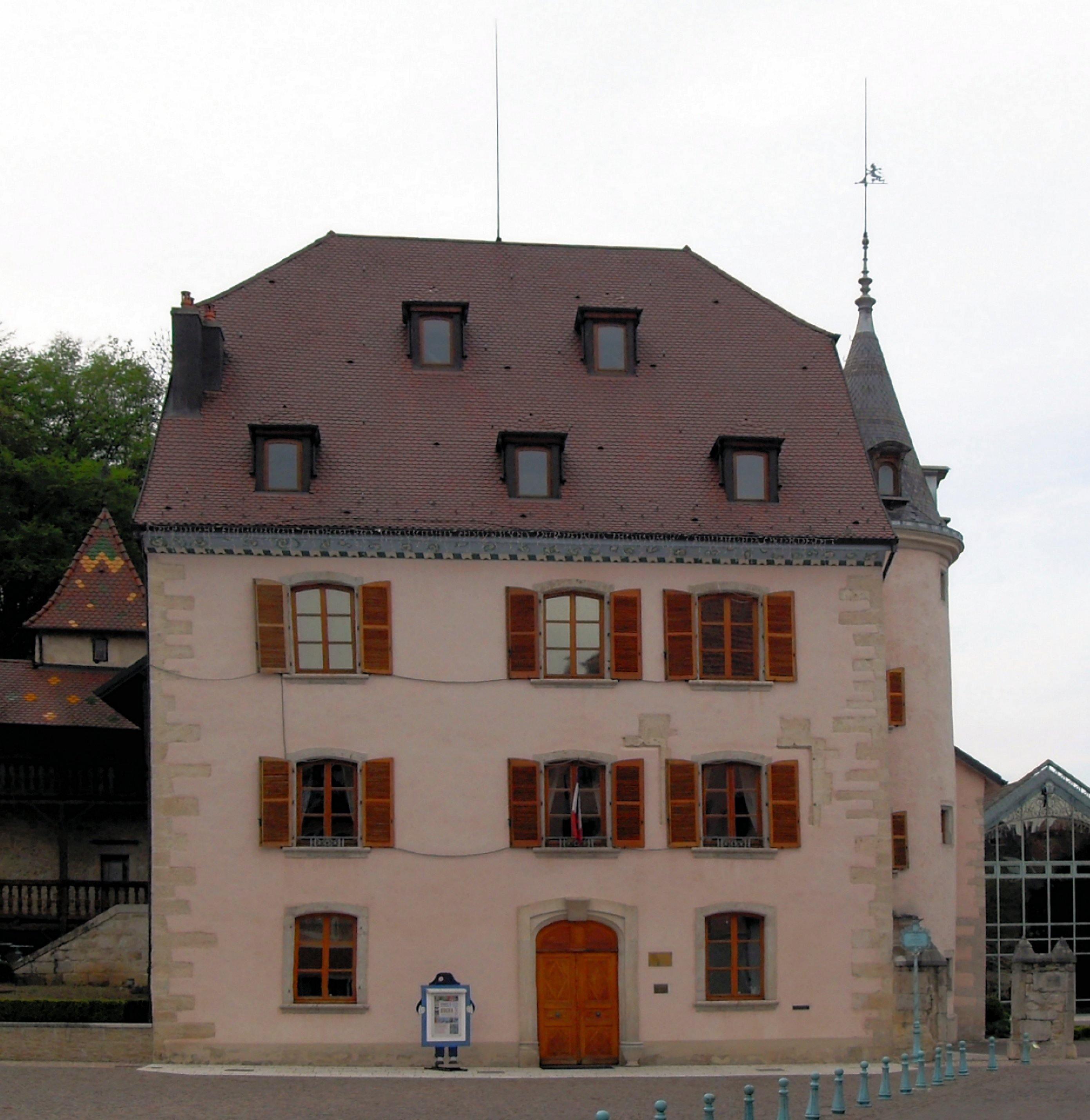 La maison Feltin, aujour'hui l'hôtel de ville de Delle